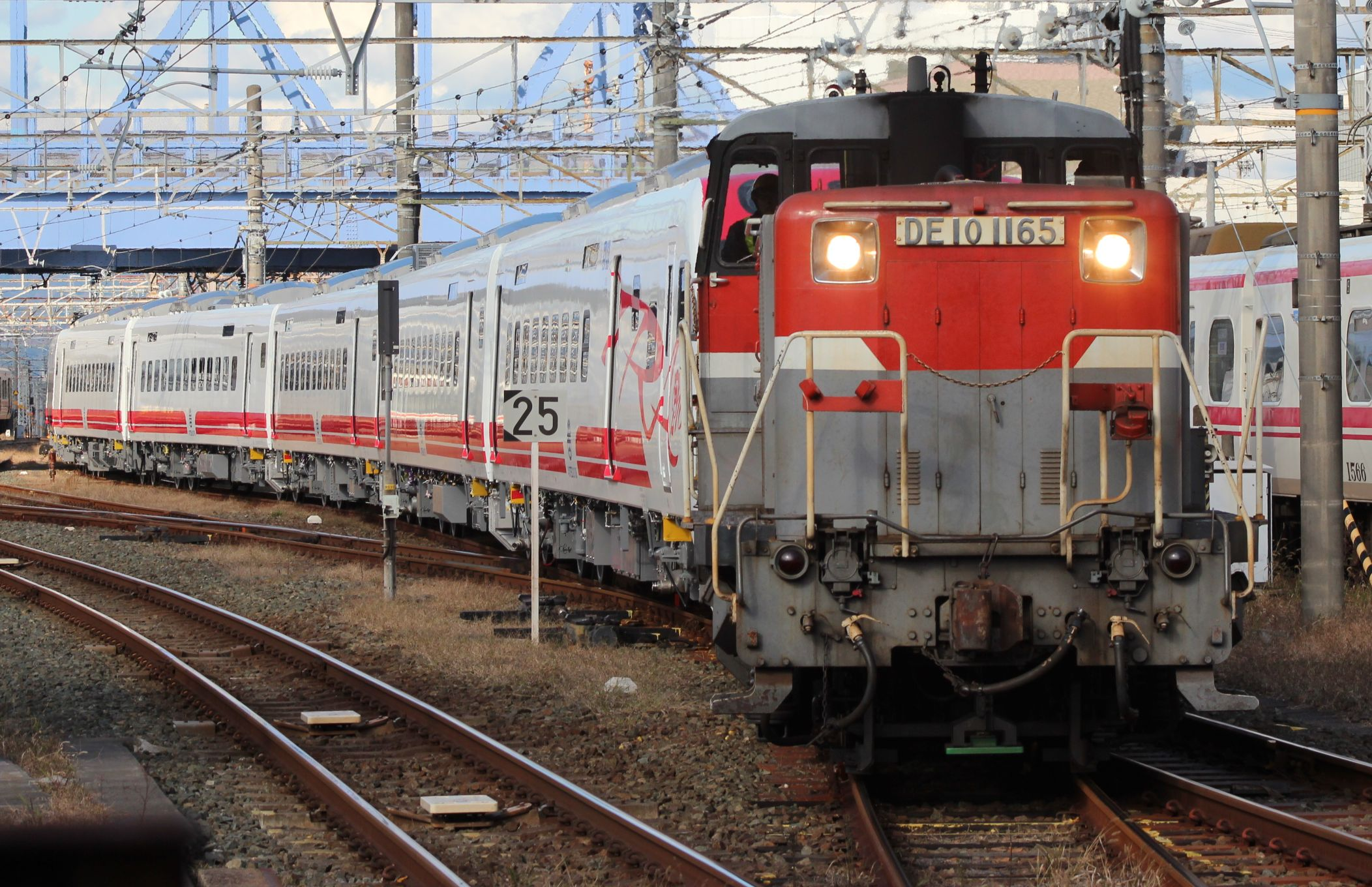 甲種輸送される台湾鉄路管理局TEMU2000形電車（豊橋駅にて）